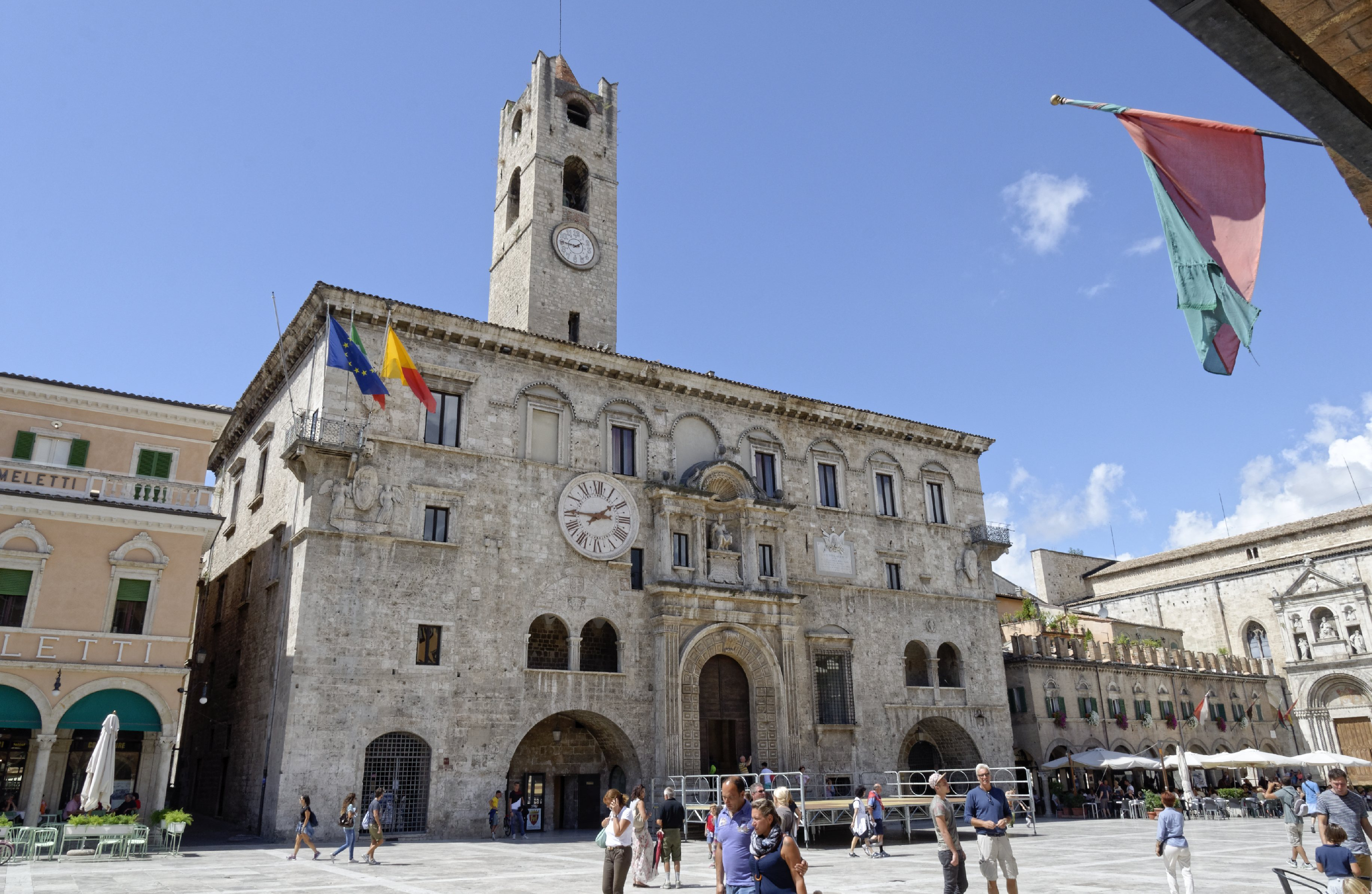 Ascoli Piceno 2015 Dieses Foto entstand in Zusammenarbeit mit Stadtbesichtigungen.de Die Seiten Stadtbesichtigungen.de, der dazugehörige Reise Blog sowie die Facebookseite: Stadtbesichtigungen Rom dürfen dieses Bild für Ihre Veröffentlichungen ohne den Hinweis auf Wikipedia, Commons bzw der Lizenz verwenden. Die Verantwortlichen habe von mir (Ra Boe) die Originaldaten zur freien Verfügung übermittelt bekommen.